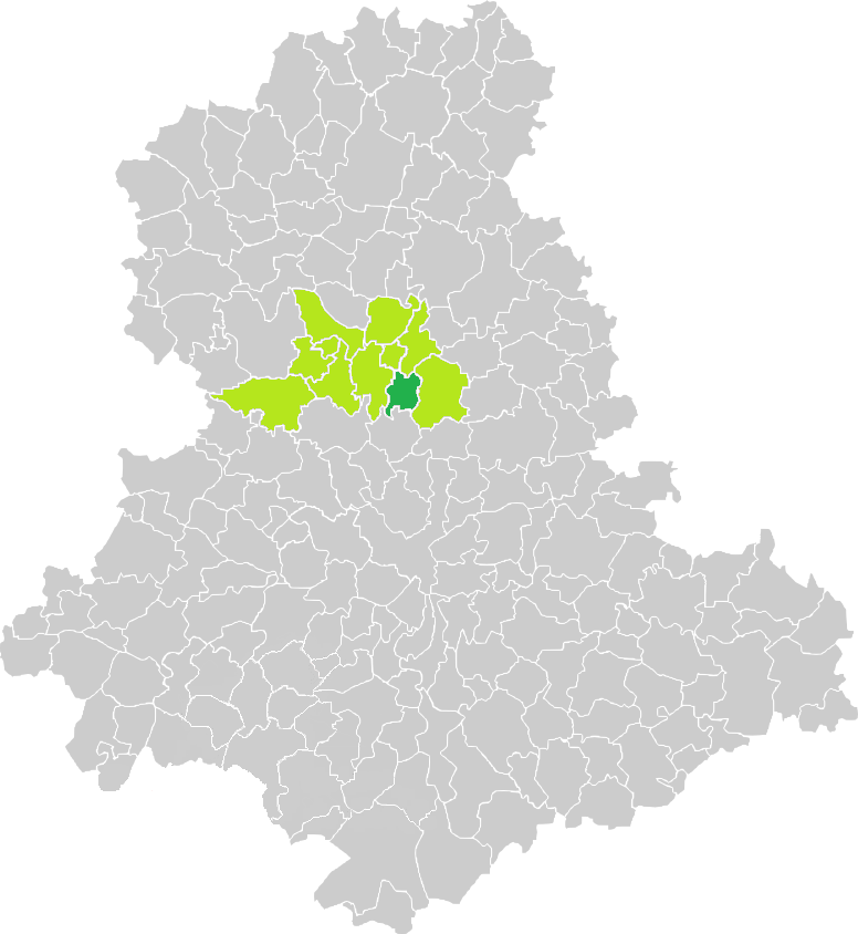 Carte de situation de la commune de Thouron (en vert foncé) dans le votre Canton (en vert clair) sur une carte des communes de la Haute-Vienne